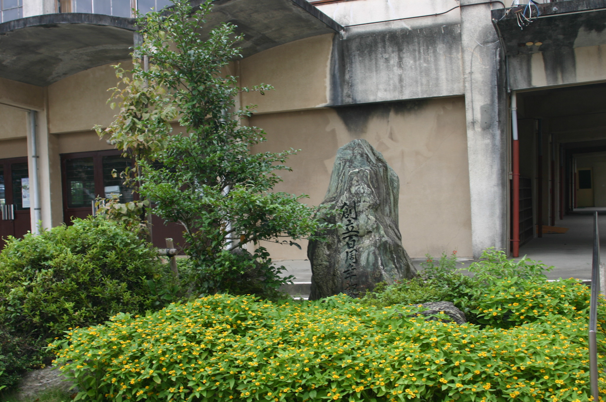 金長神社近景２